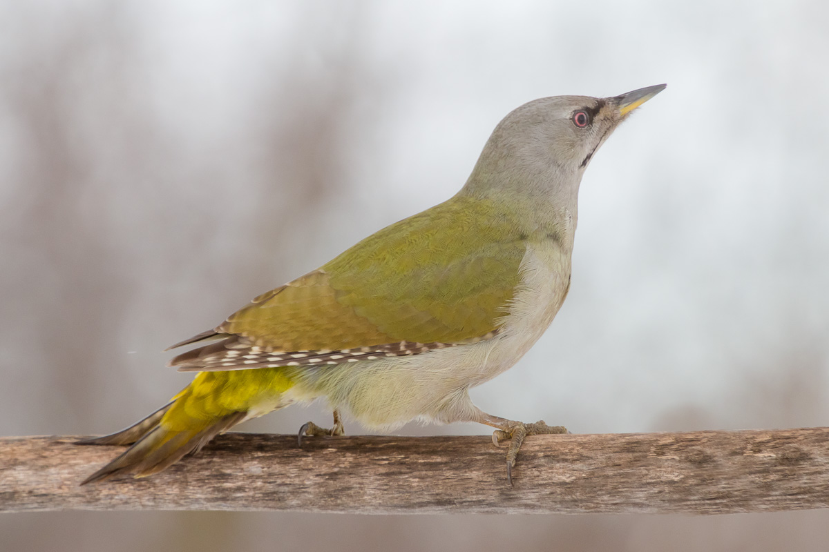 самка